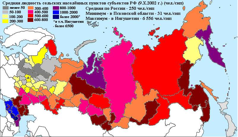 карта средней людности сёл субъектов РФ (2002)